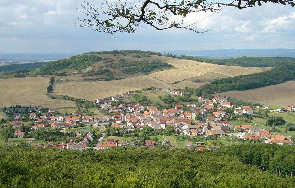 Das Dorf Holungen und der Sonnenstein (FFH-Gebiet Waldgebiet um Wenderhütte, mit Soolbachtal und Sonnenstein) von der Sonder aus gesehen (rechts am Bildrand der Wehenberg und Krantberg und im Hintergrund der Harz )